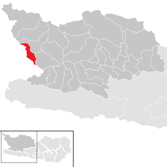 Bezirk Spittal an der Drau